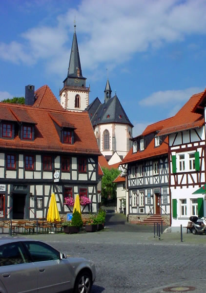 Blick auf den sogenannten 'Malerwinkel' in Oberursel